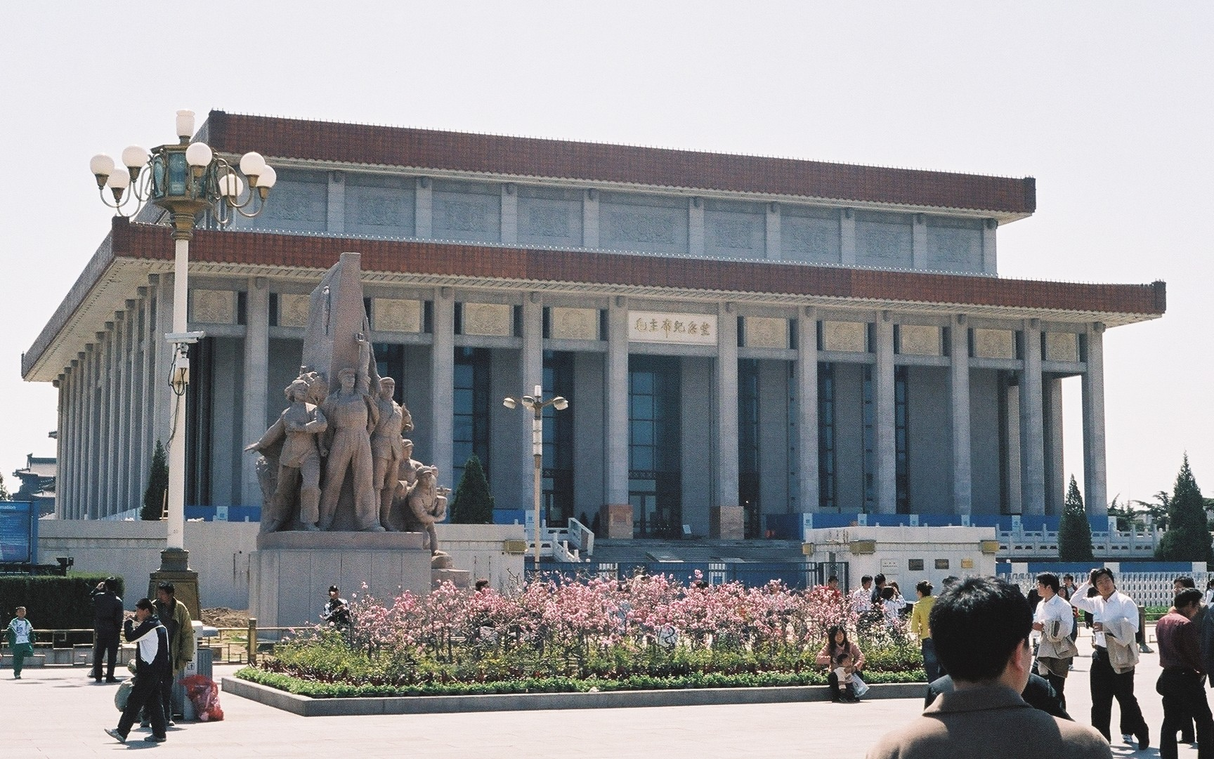 Mausolée de Mao à Pékin